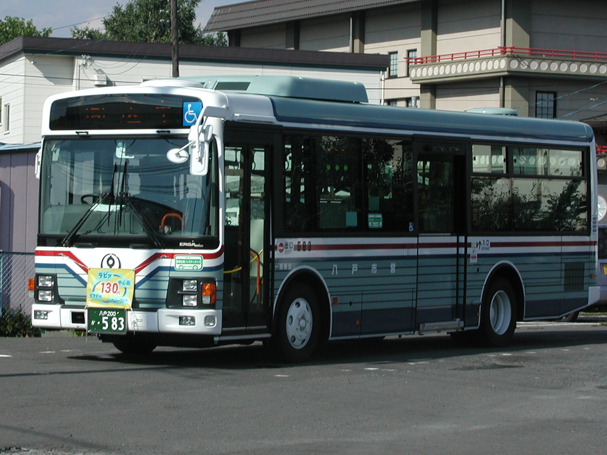 八戸市交通部 いすゞ・エルガミオノンステップ(PDG-LR234J2/自主発注)